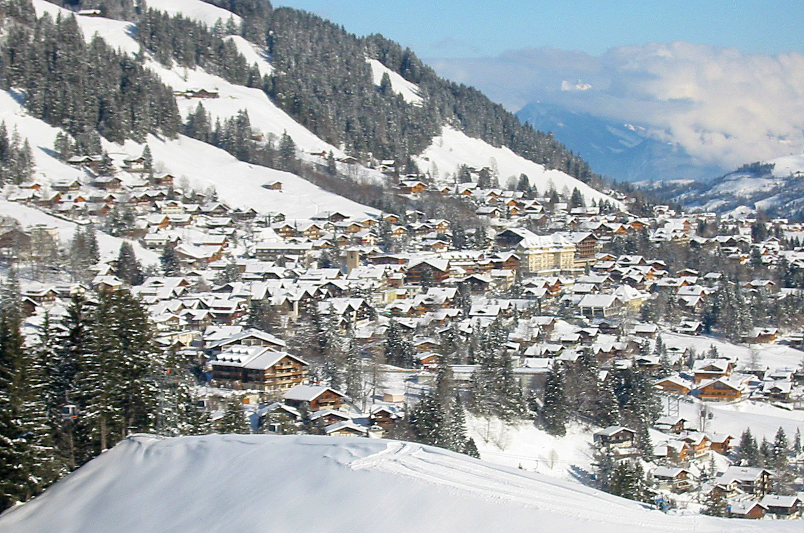 Adelboden, Februar 2005 Fotografiert von Benutzer:Filzstift mit einer Billigkamera 14:12, 11. Mär 2005 Filzstift 1577 x 1045 (782965 Byte)